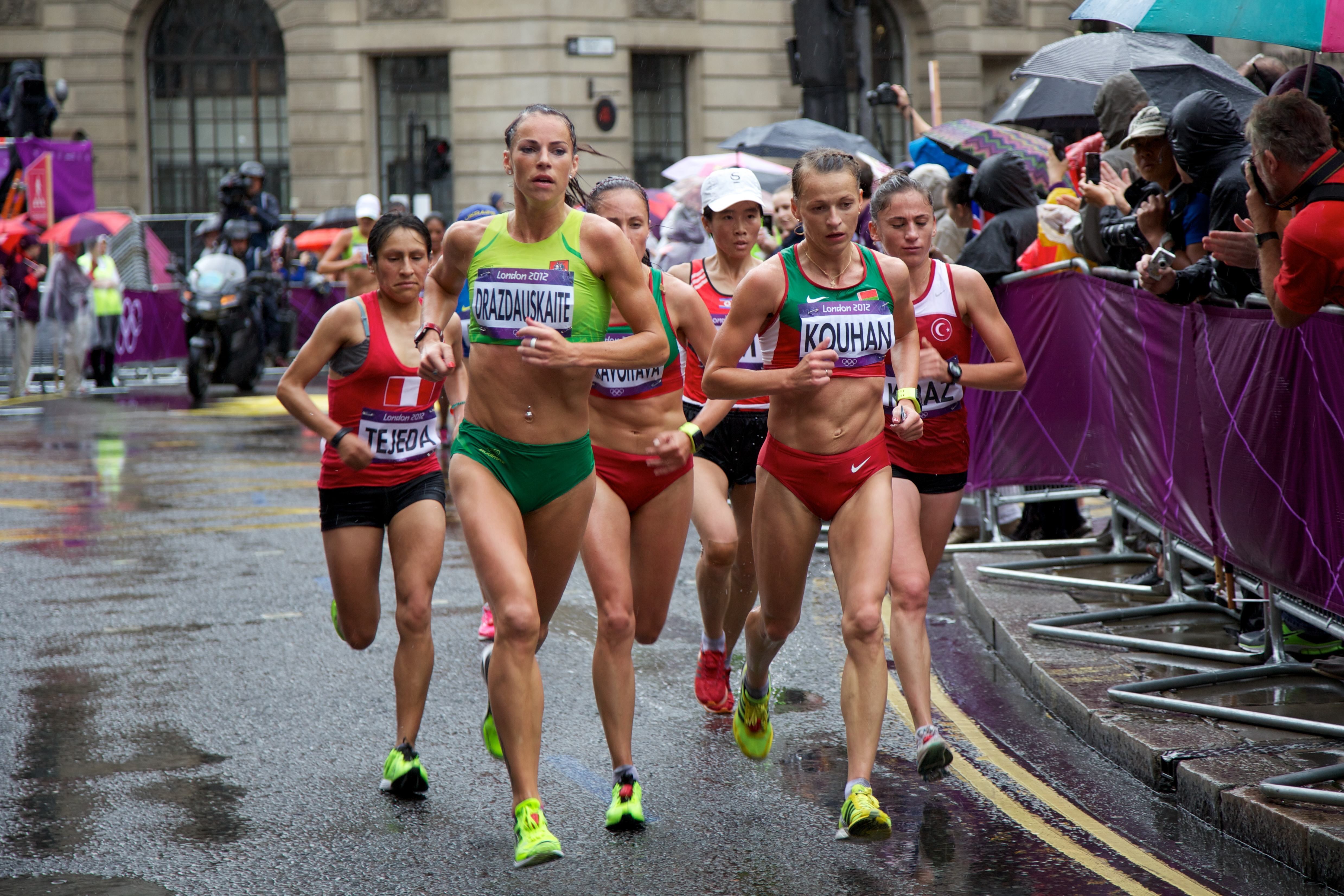 Women's Marathon, Gladys Tejeda (Peru), Rasa Drazdauskaite (Lithuania), Nastassia Staravoitava (Belarus), Sviatlana Kouhan (Belarus), Ummu Kiraz (Turkey)